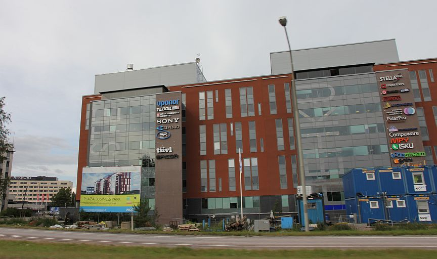 Veromiehen kaupunginosan yritysaluetta heti Kehä III:n pohjoispuolella. Esimerkiksi pörssiyritys Uponorin pääkonttori sijaitsee kuvan rakennuksessa. Huom: Muista säilyttää viittaus kuvaajaan, mikäli käytät kuvaa.